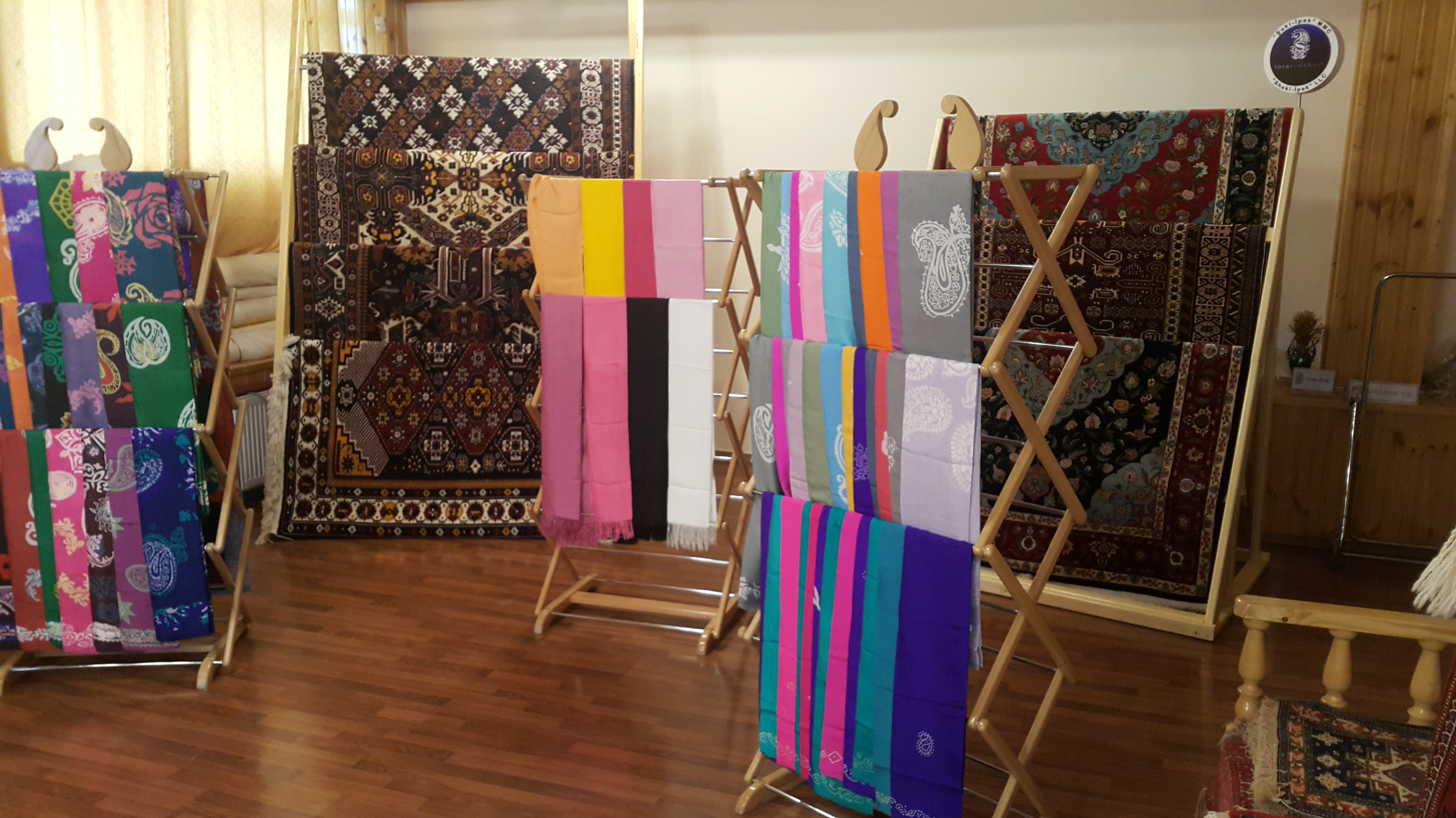 İpək və xalça şourumu